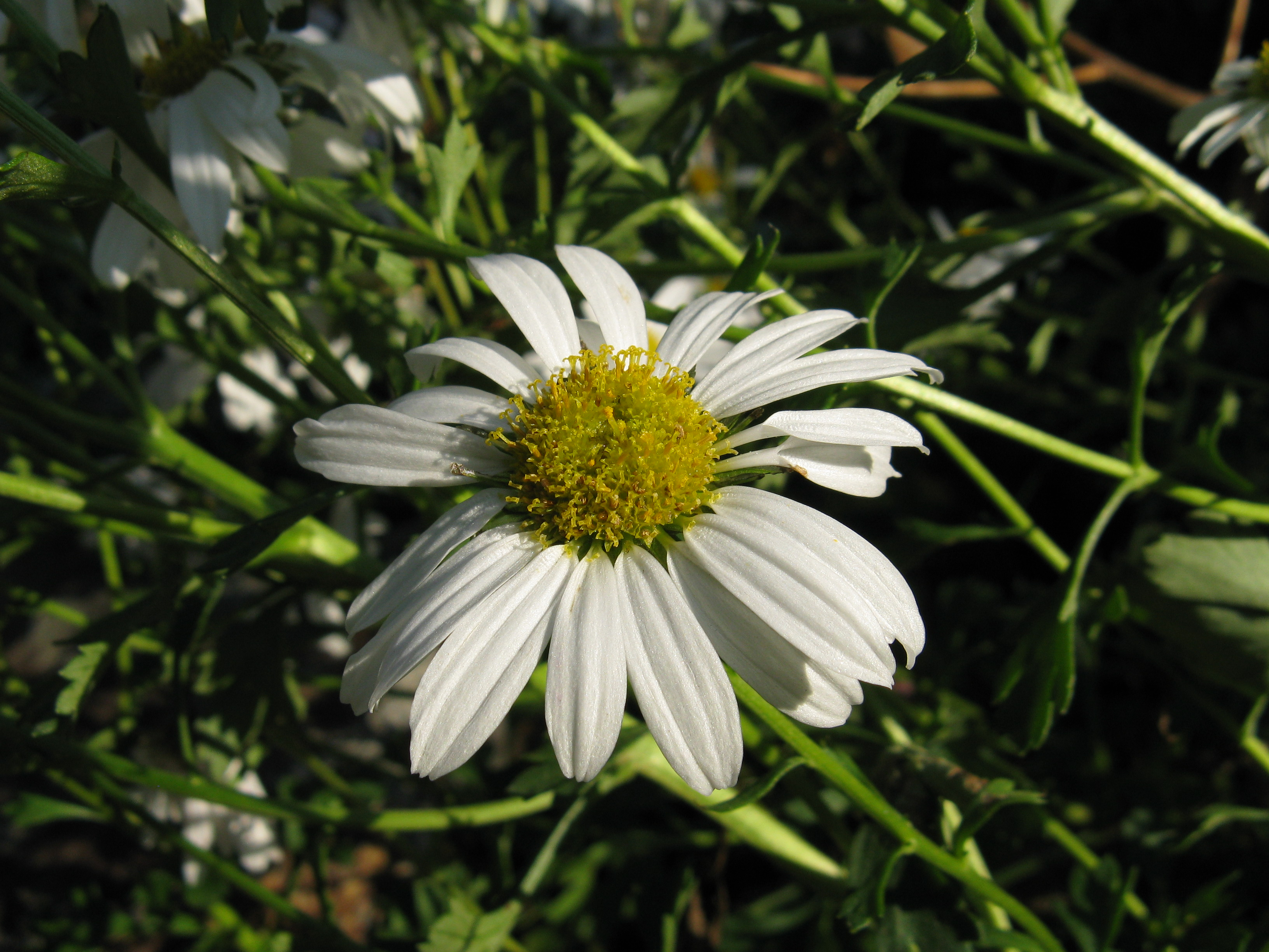 Chrysanthemum zawadskii var. latilobum